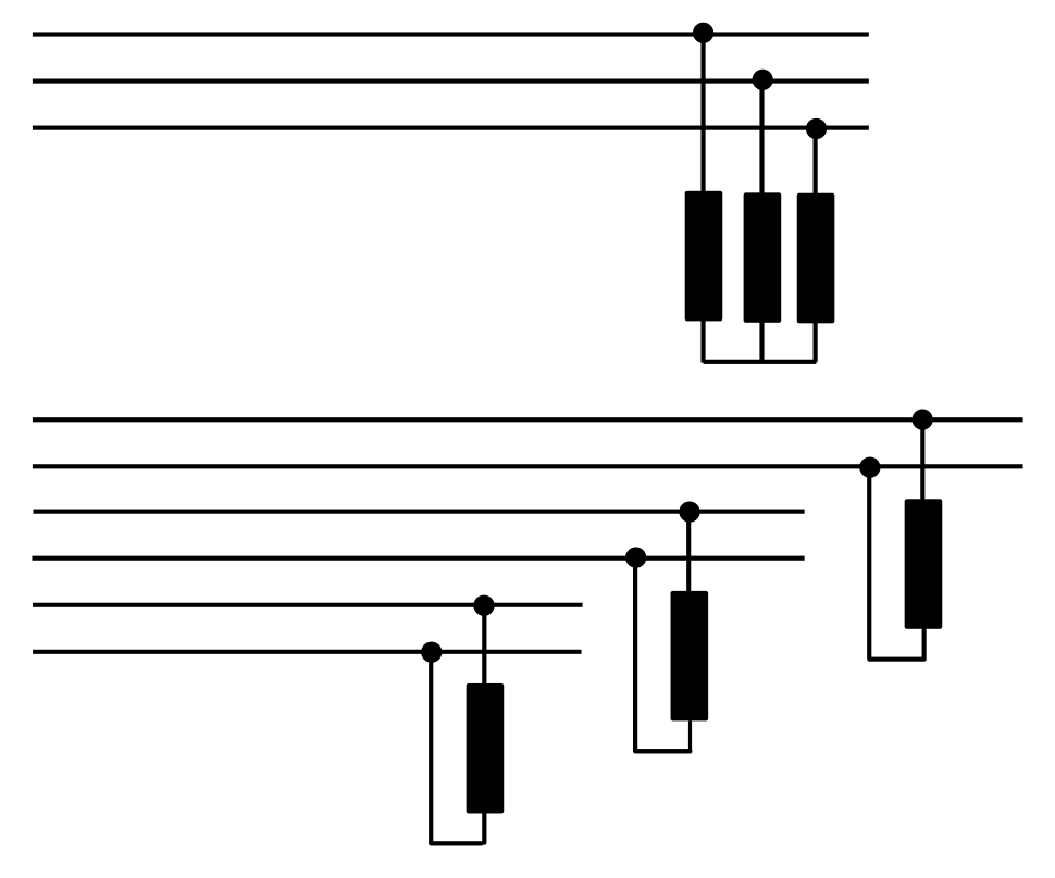 Jämförelse, kabeldragniing, trefas, enfas